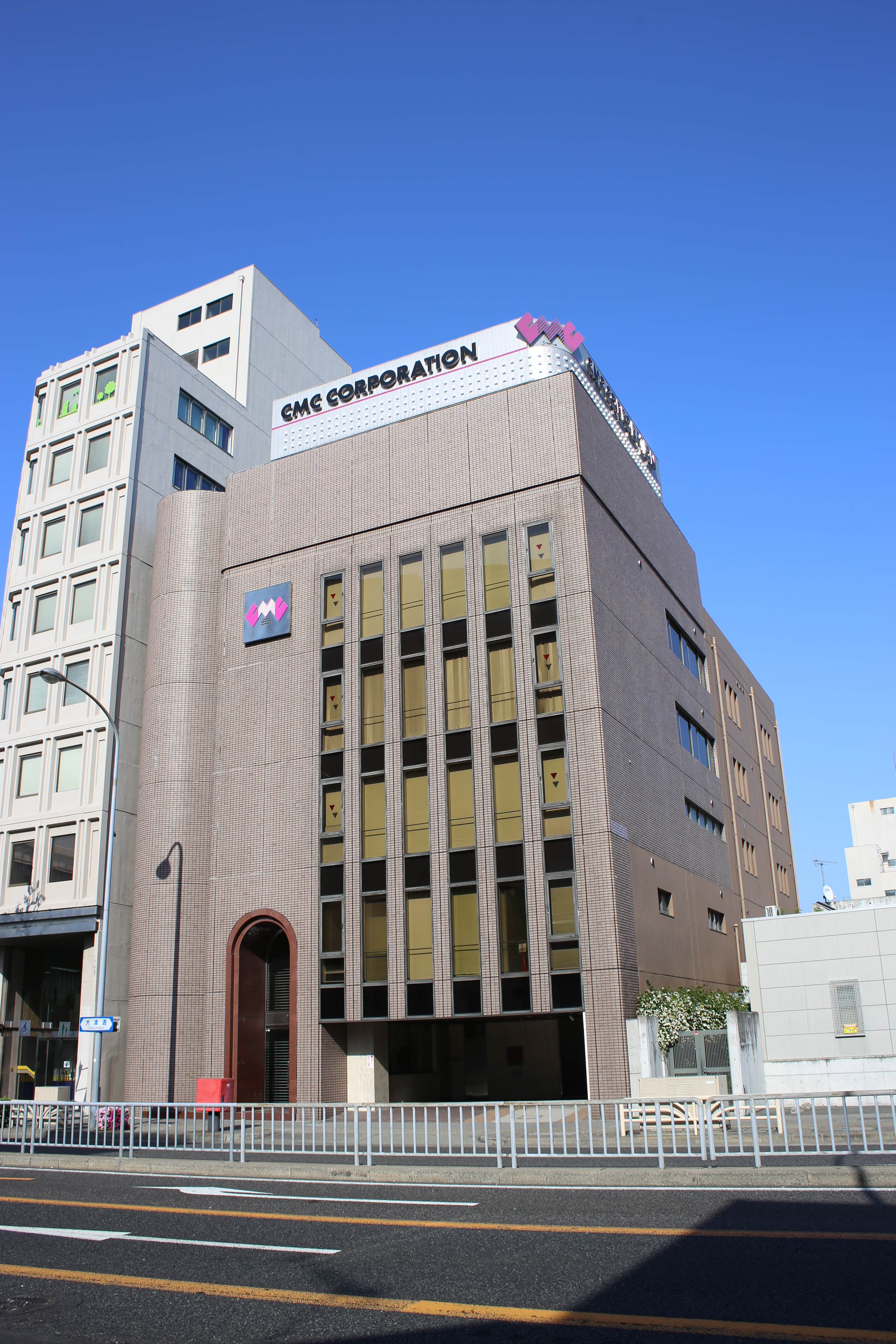 名古屋市中区平和一丁目の株式会社シイエム・シイ本社を西側公道南側より撮影